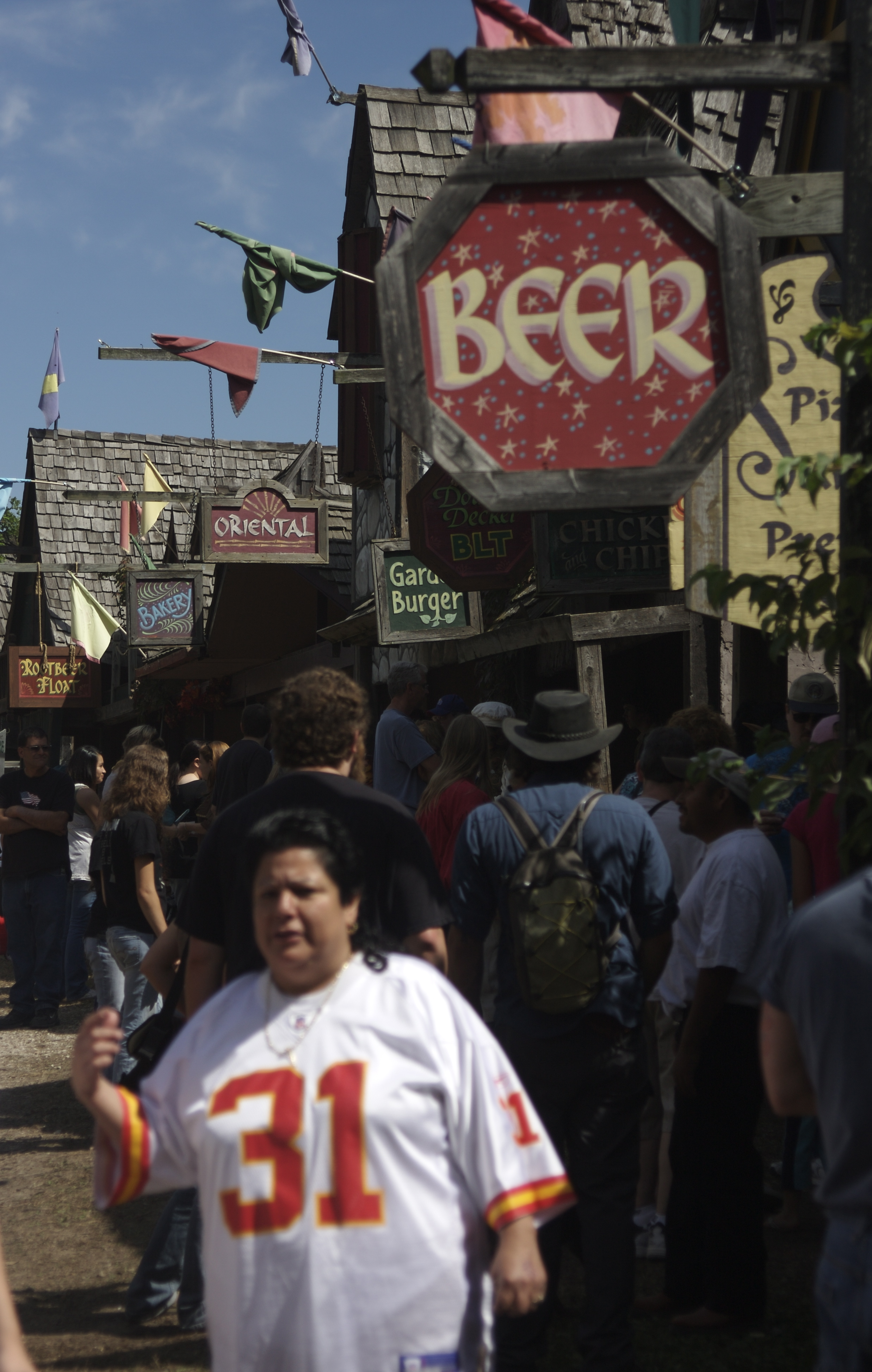 Beer